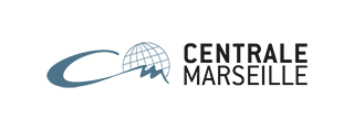 Le logo en version petit format de l'école centrale de Marseille